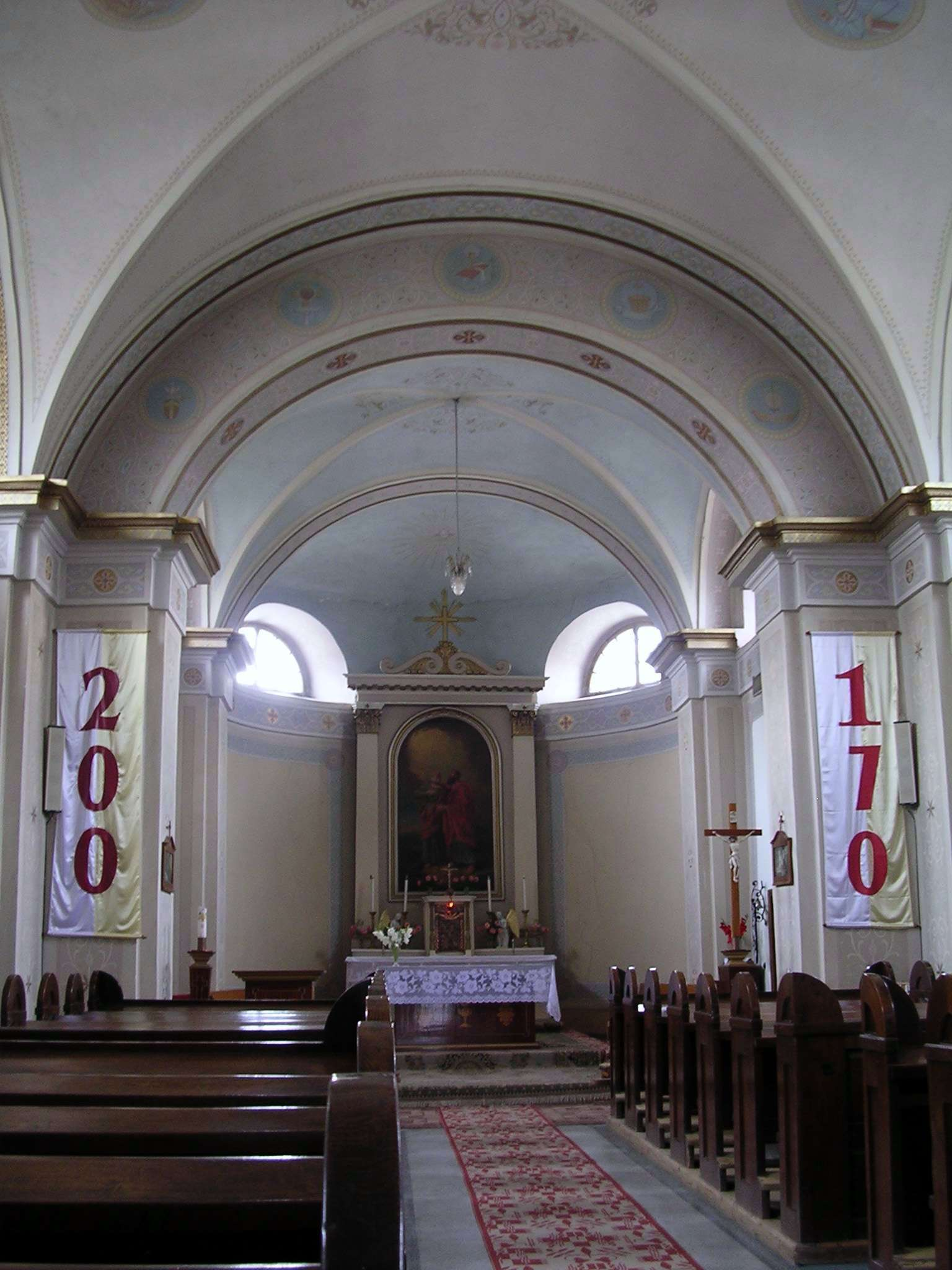 Aknasugatagi templom belül